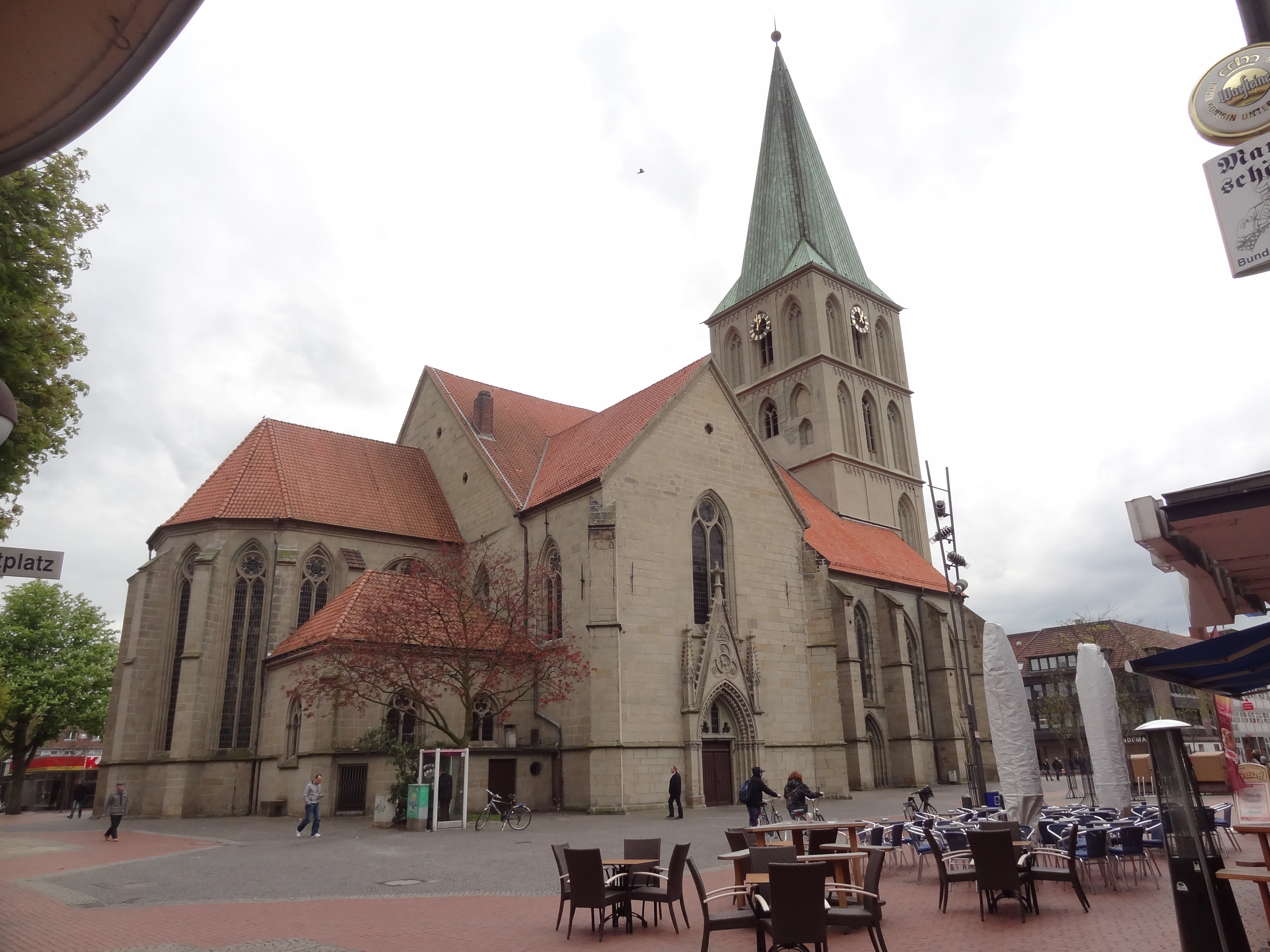 Hamm, Germany